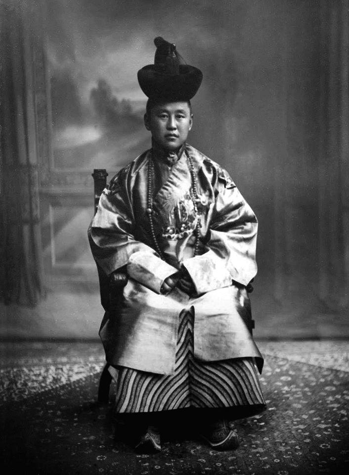 Монгол: Namnansuren